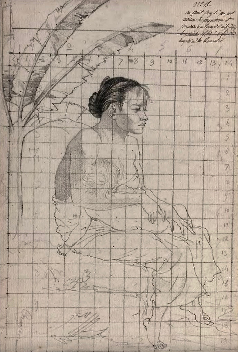 Nicolas-Martin Petit (1777–1804): Sitzende Frau mit Kind vor Bananenpalme, Westtimor (Batavische Republik) 1801. Der Künstler war mit Mitglied der französischen Australienexpedition unter Nicolas Baudin (1800–1804).